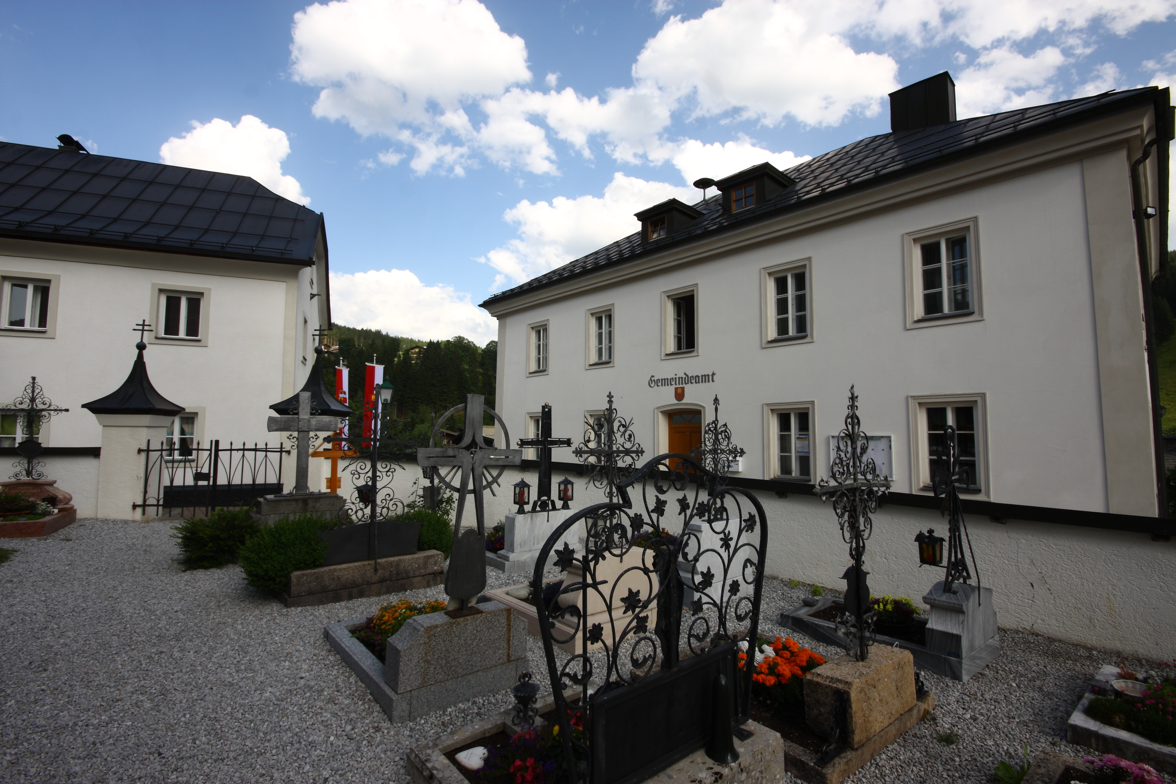 Friedhof der Pfarrkirche hll. Petrus und Paulus und Gemeindeamt Filzmoos